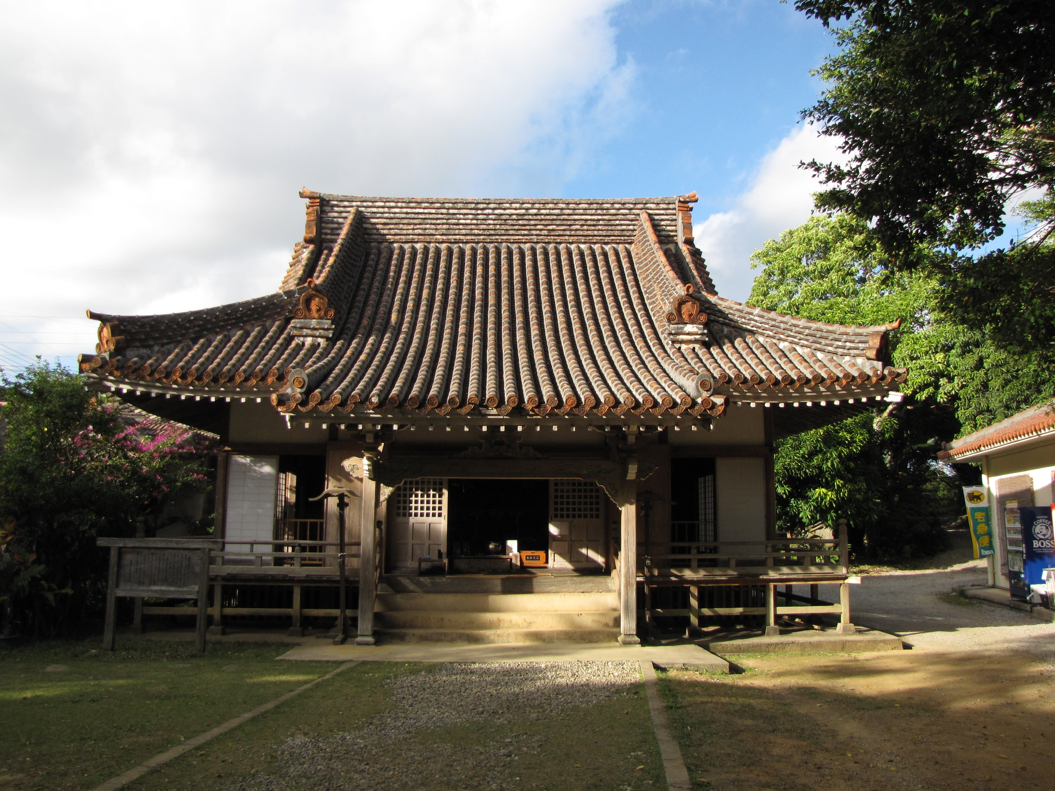 観音寺（沖縄県金武町）本堂